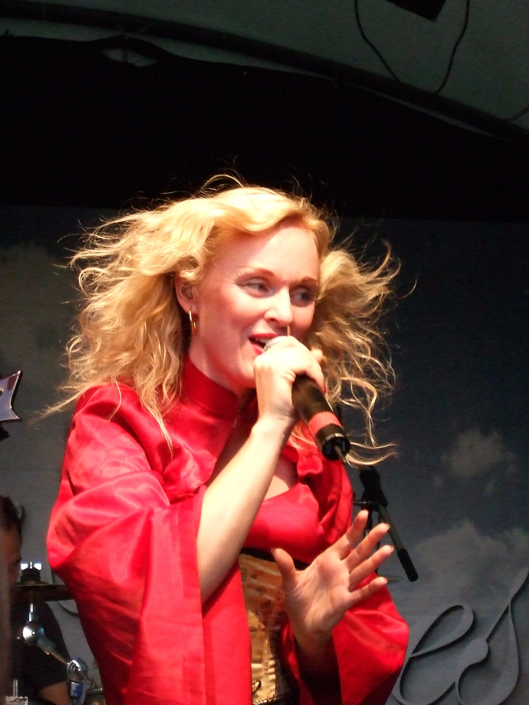 Leaves' Eyes, Liv Kristine #3, Henkersfest Stuttgart, July 2007